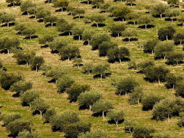 Olivi coltivati nella zona del massiccio dei Monti Iblei, Sicilia – Italia.